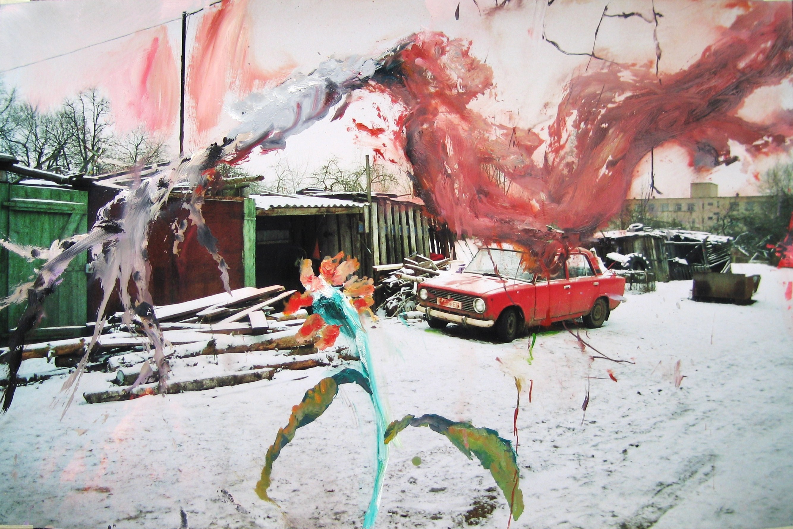 Художник Игорь Тишин. "Кризис в Раю"-1, 2009, 50,5x75 см, фотопринт, масло.